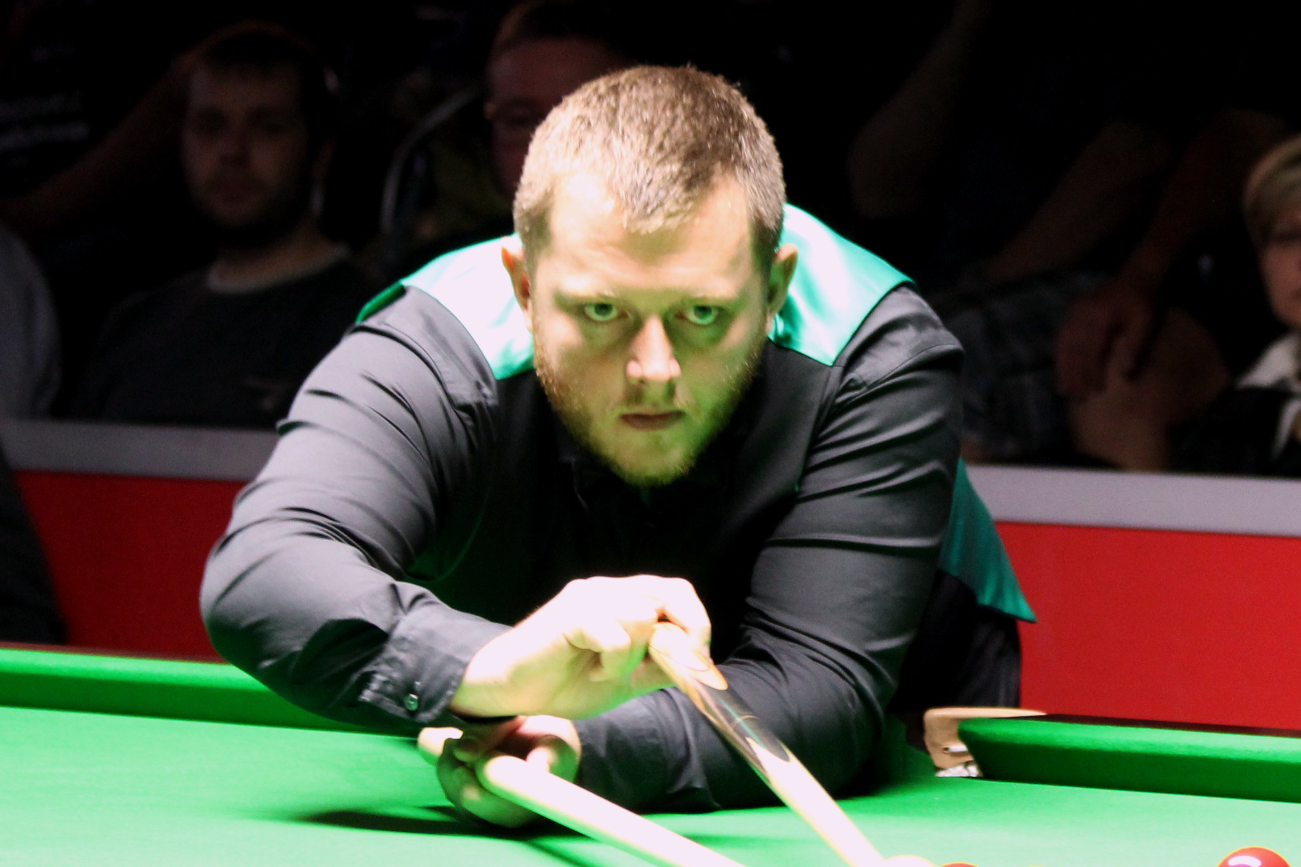 Mark Allen beim Paul Hunter Classic 2016